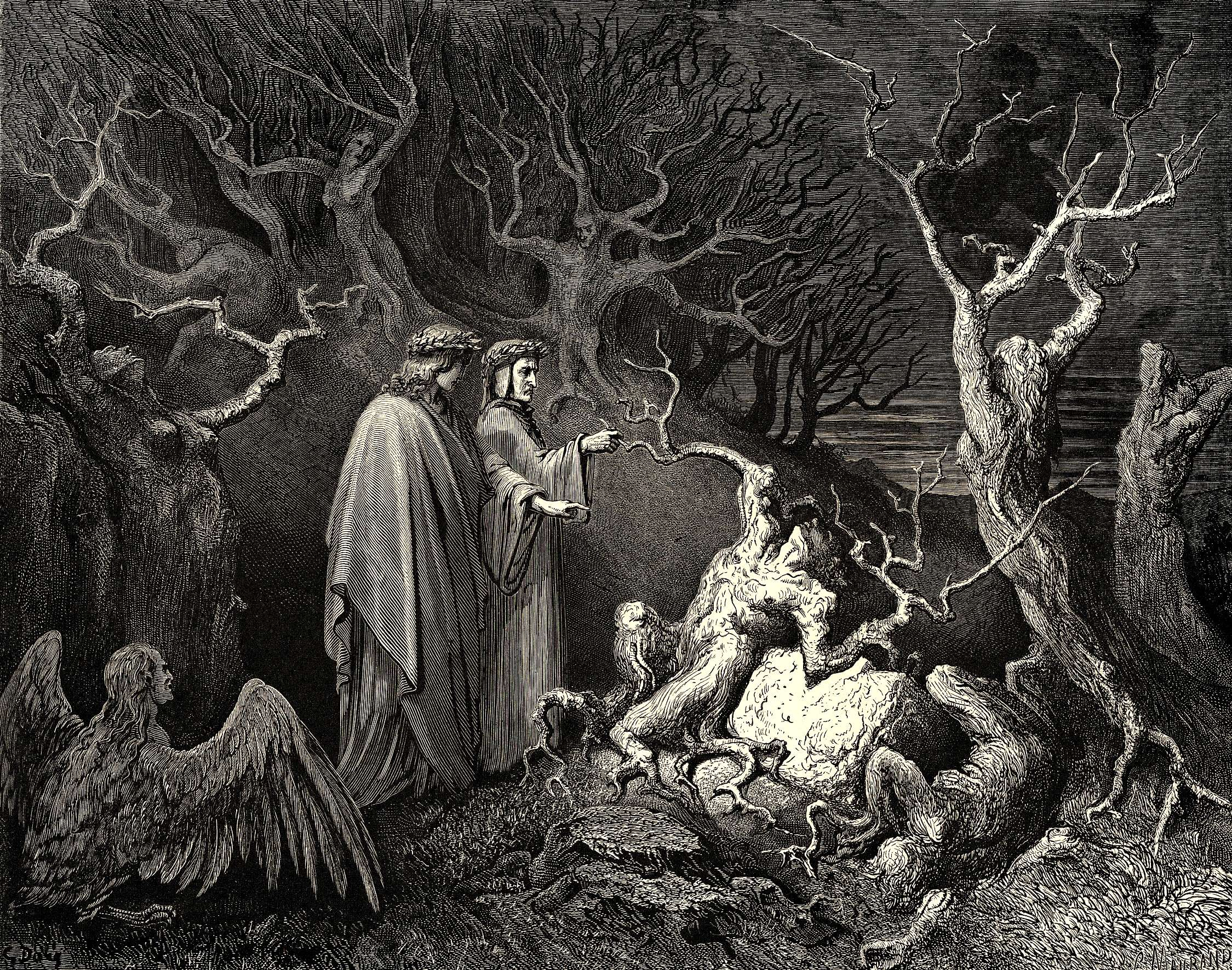 Gustave Doré, The Inferno, Canto 13, etching